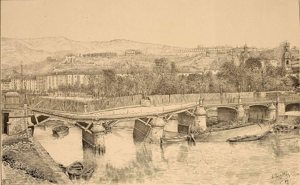 Isabel II.aren zubia kaltetuta 1878ko apirilean